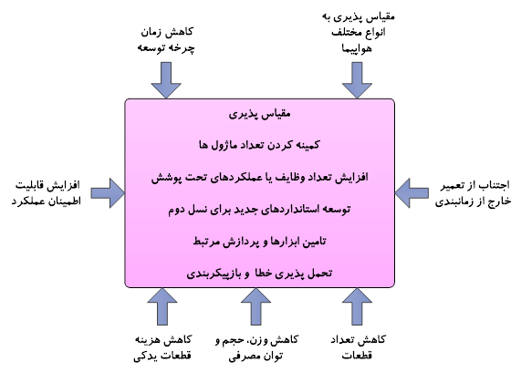 شکل ۵ عوامل موثر در توسعه IMA